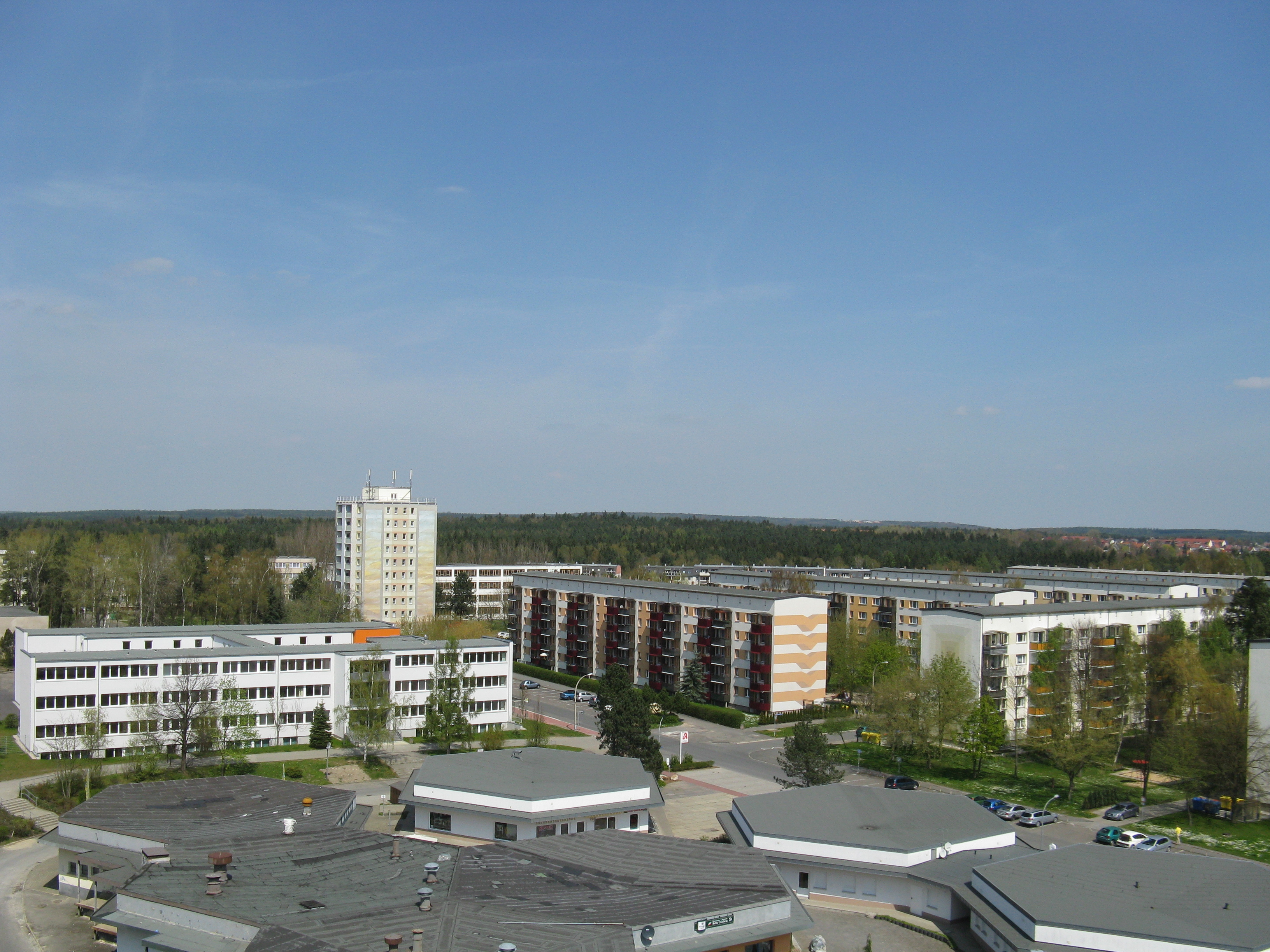 Blick auf Teile des Wohngebietes "Waldsiedlung" im norden der Stadt Hermsdorf. Die Flachbauten im Vordergrund der "Waldsiedlungsmarkt", dahinter die Regelschule "Am Hermsdorfer Kreuz" in der Erich-Weinert-Straße.